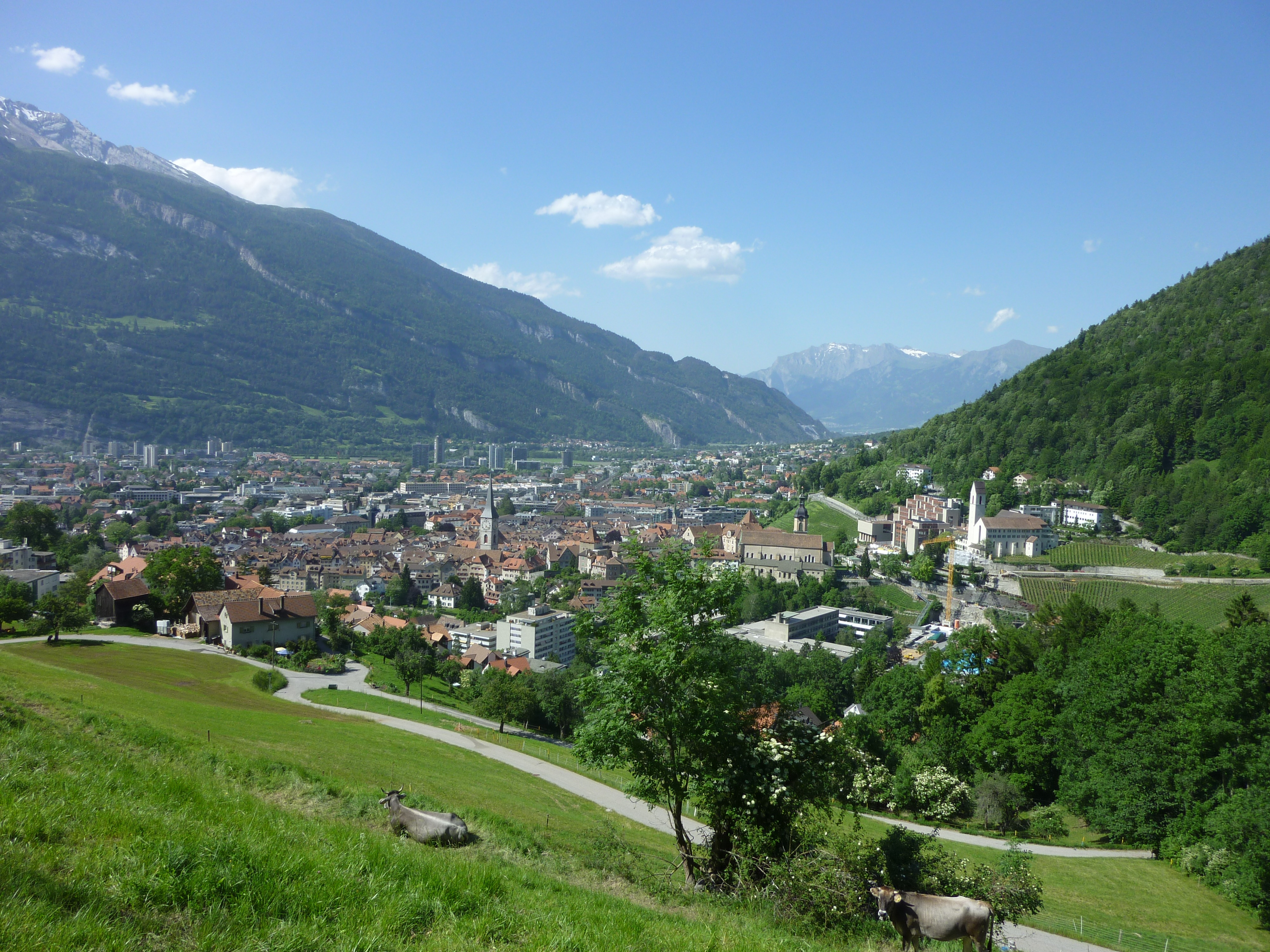 Chur Juni 2010